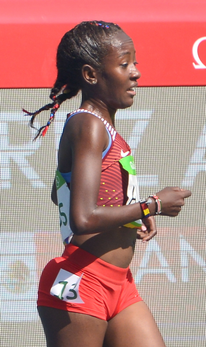 La 1er série du 5000m féminin à Rio 2016